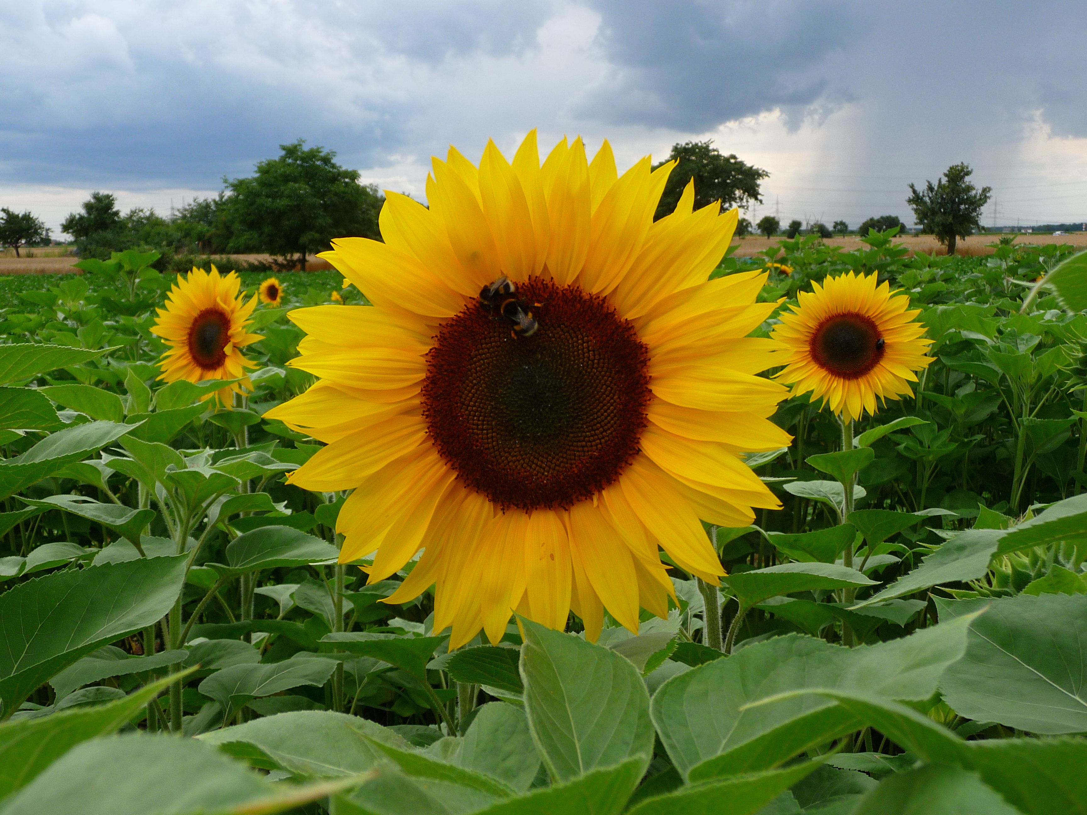 Drei Sonnenblumen (Helianthus annuus) im Feld vor einem aufziehenden Gewitter